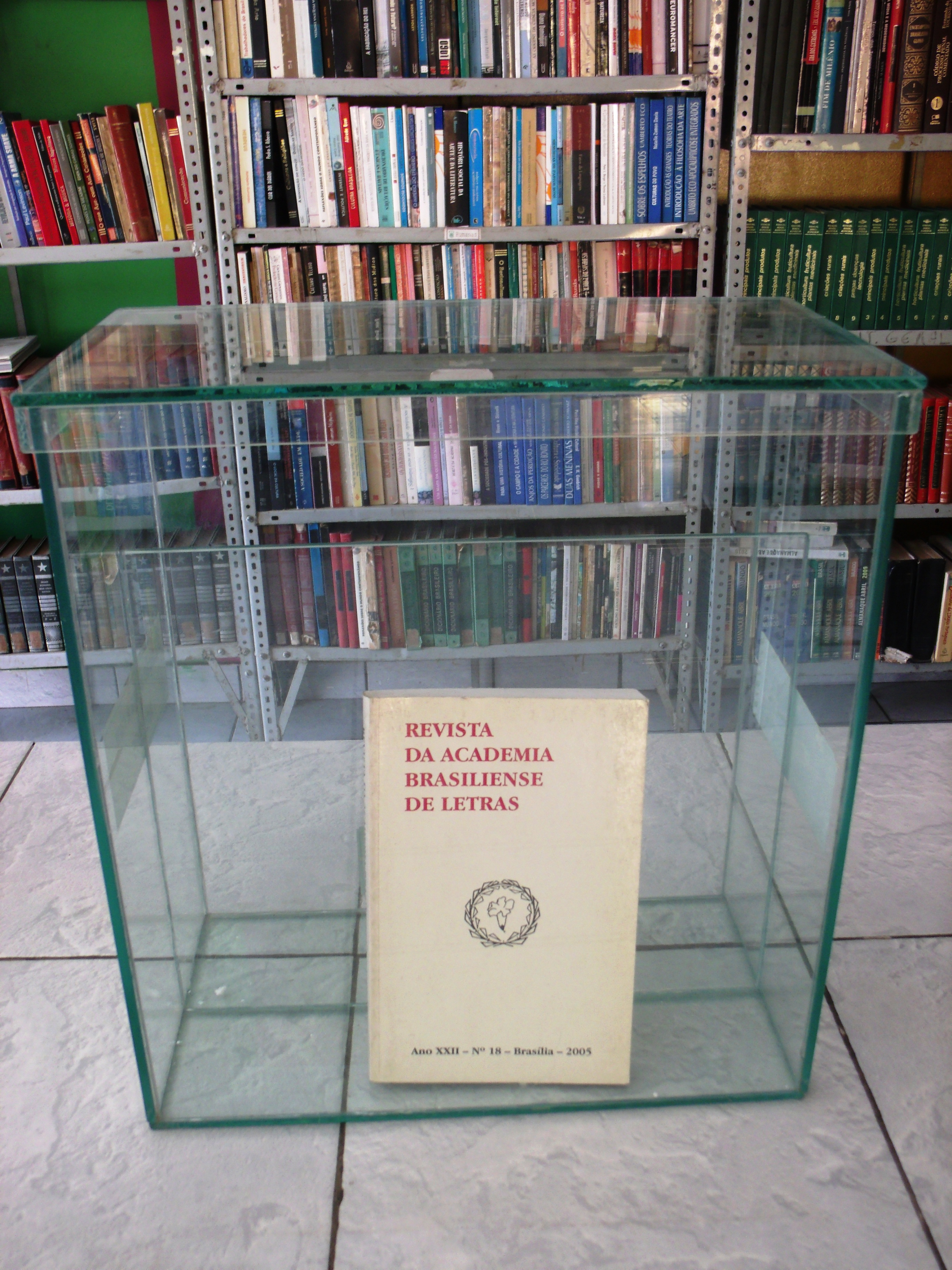 Exposição de revistas literárias do Brasil, uma edição da Revista da Academia Brasiliense de Letras.